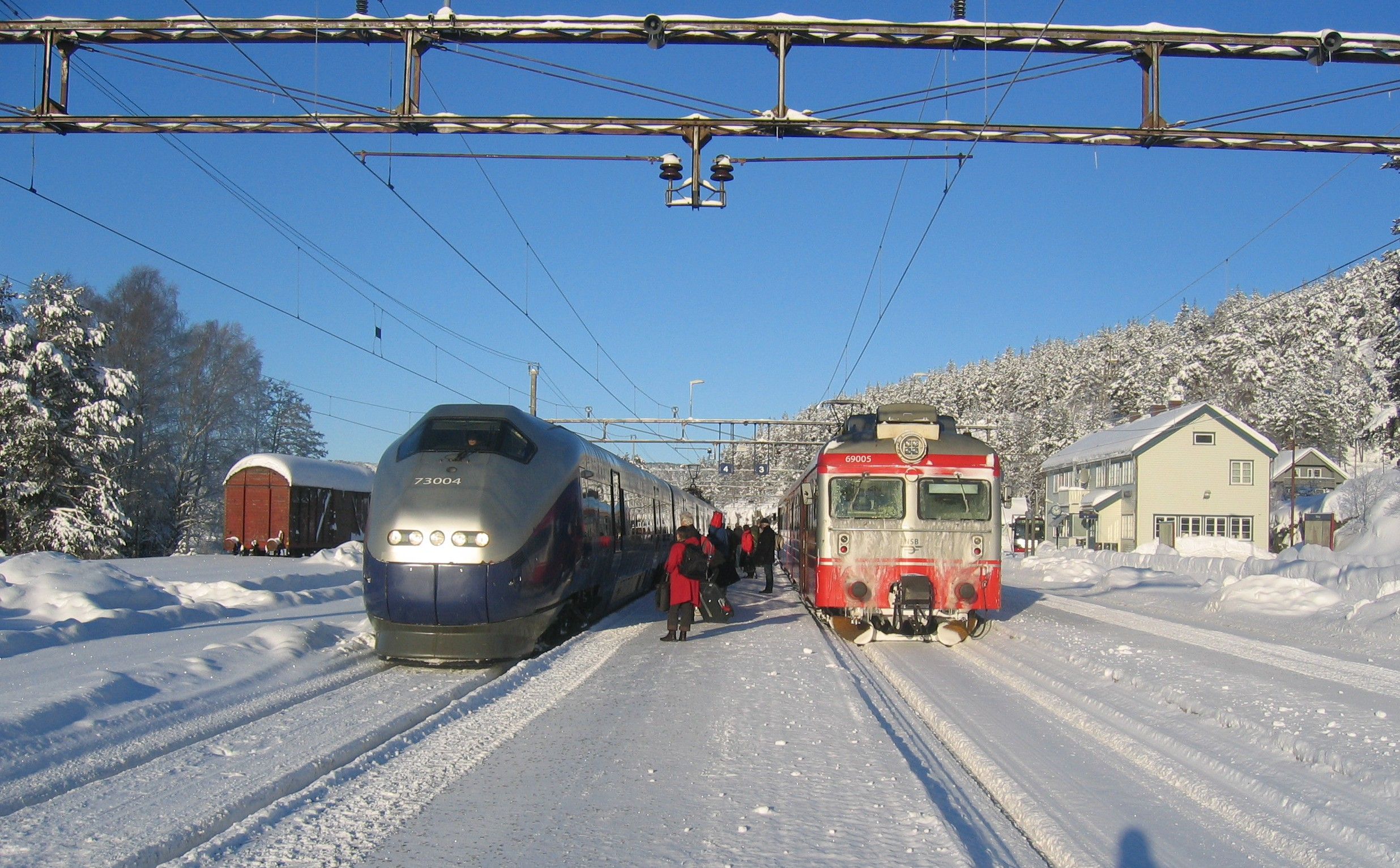 Nelaug stasjon. Regiontog til Oslo t.v. Lokaltog fra Arendal t.h. Togbytte for reisende til Oslo.